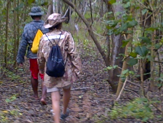 door de mangrovebossen lopen in verband met het vrijwilligers programma